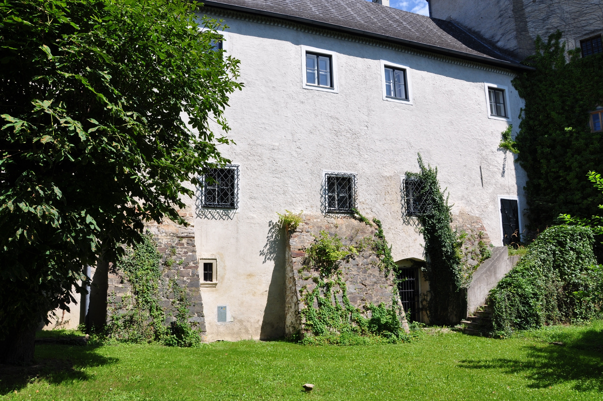 Forsthaus Vorburg der ehem Burg, Gemeinde karlstetten